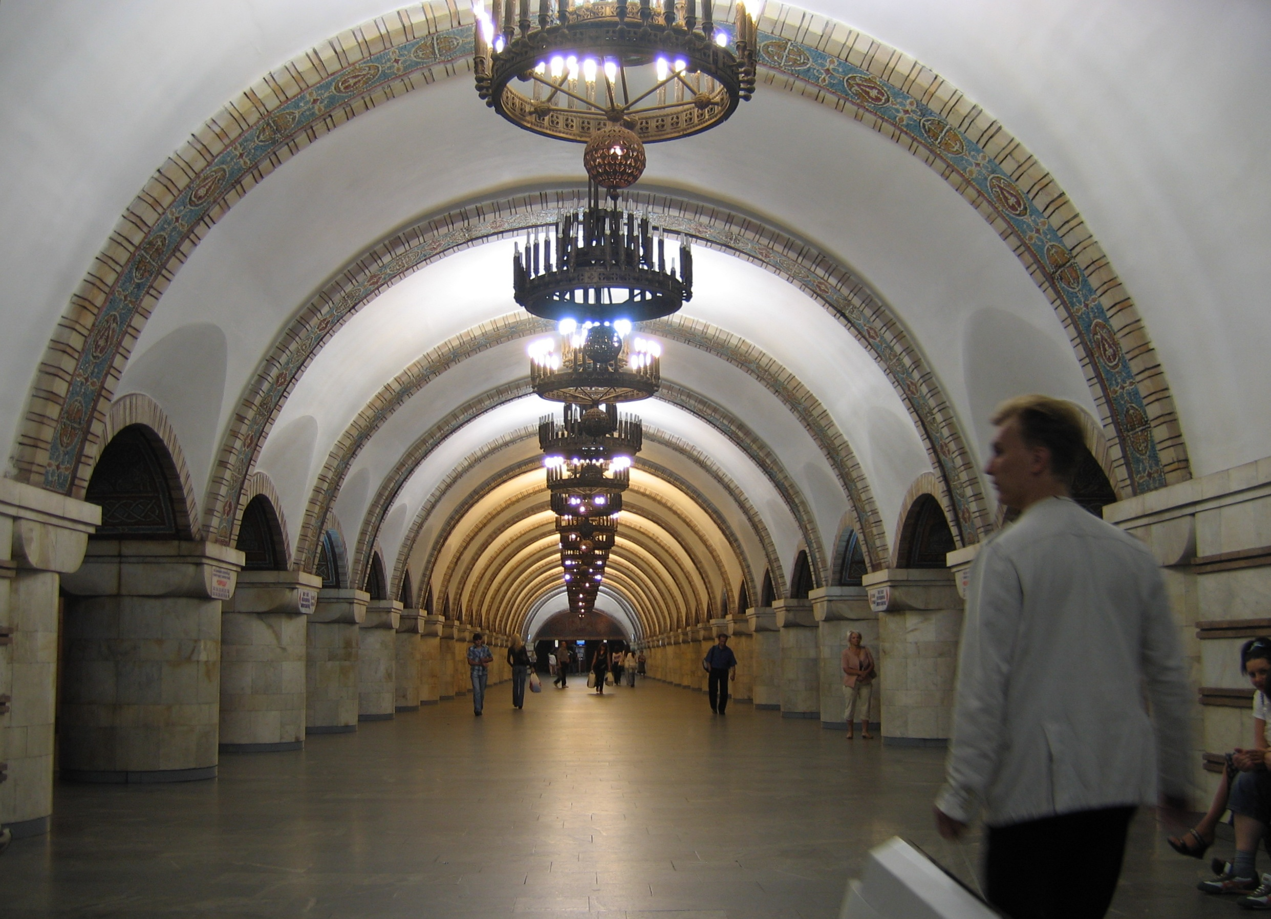 Станция метро "Золотые ворота". Центральный зал станции.